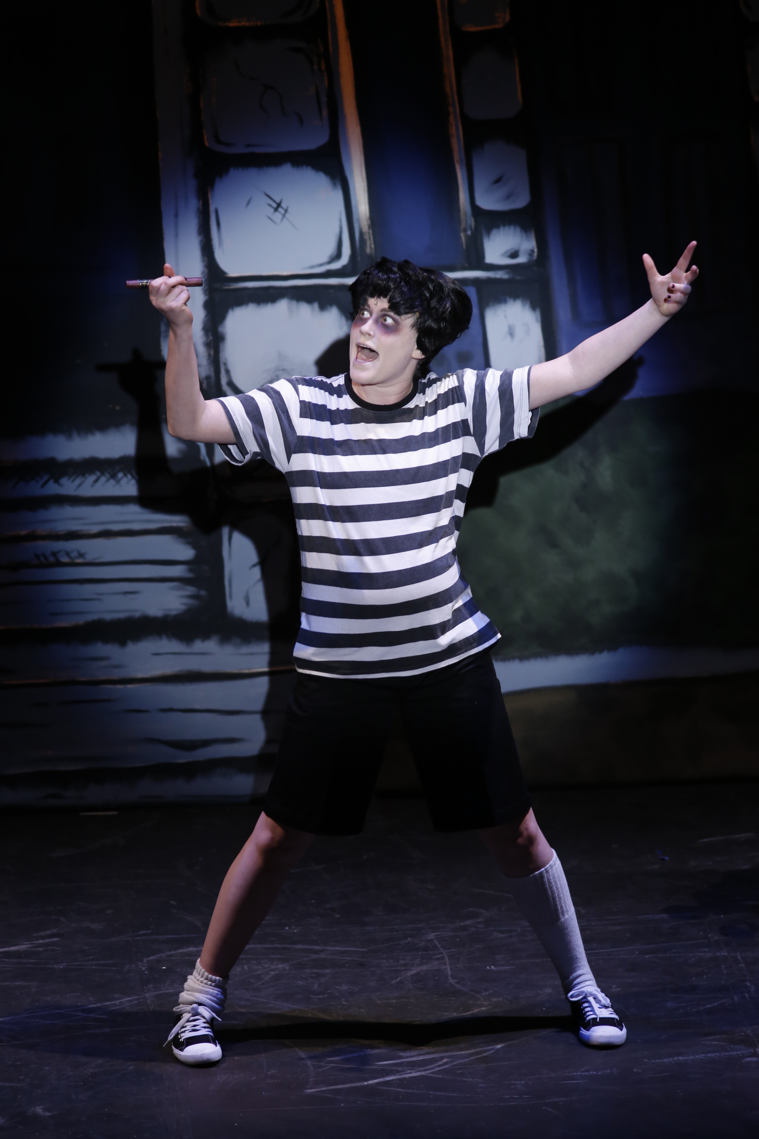 Pugsley- Dana Cullinane Photo by Karl Kuntz